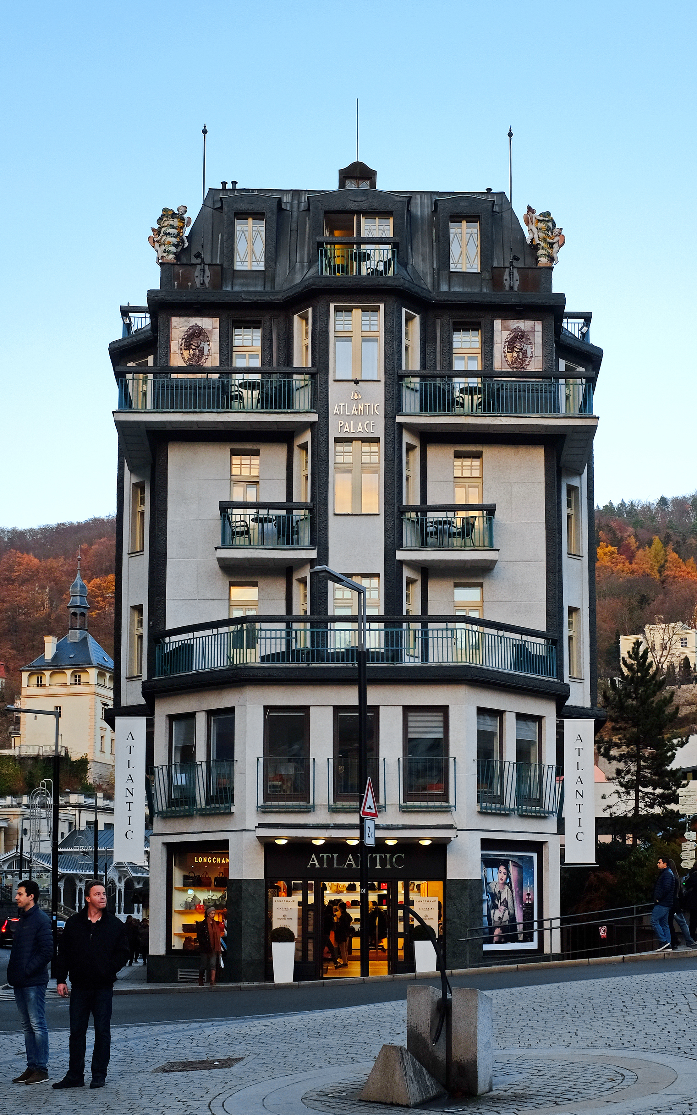 Lázeňský dům Atlantic, Tržiště 37/23, Karlovy Vary.